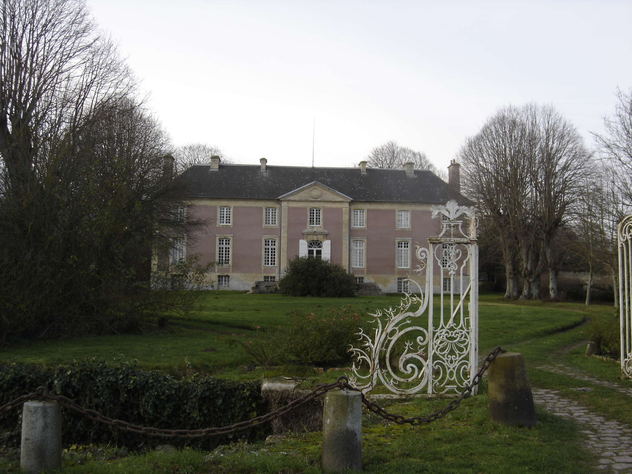 Château de Mathieu